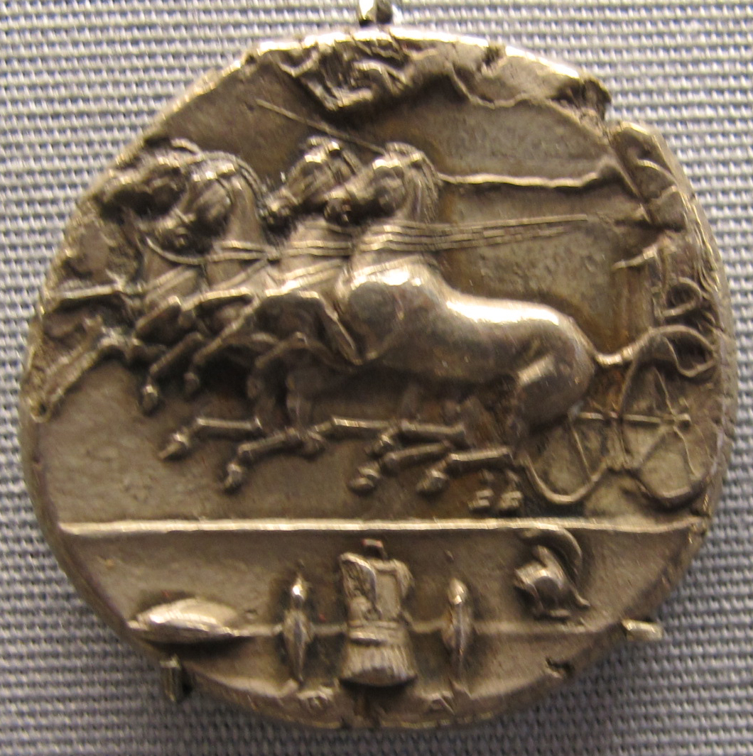 Syrakus, decadracma firmata euainetos, 413-410 ac. ca